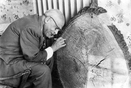 Walter Horn, der Gründer der Sternwarte Solingen